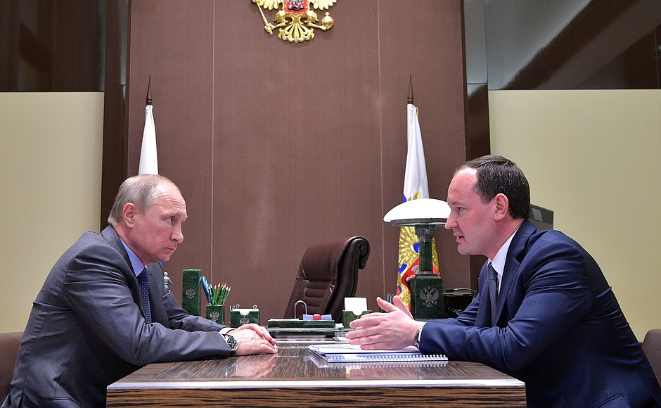 Встреча президента России В.В. Путина с генеральным директором ПАО "Россети" П.А. Ливинским 17 октября 2017 года в Сочи